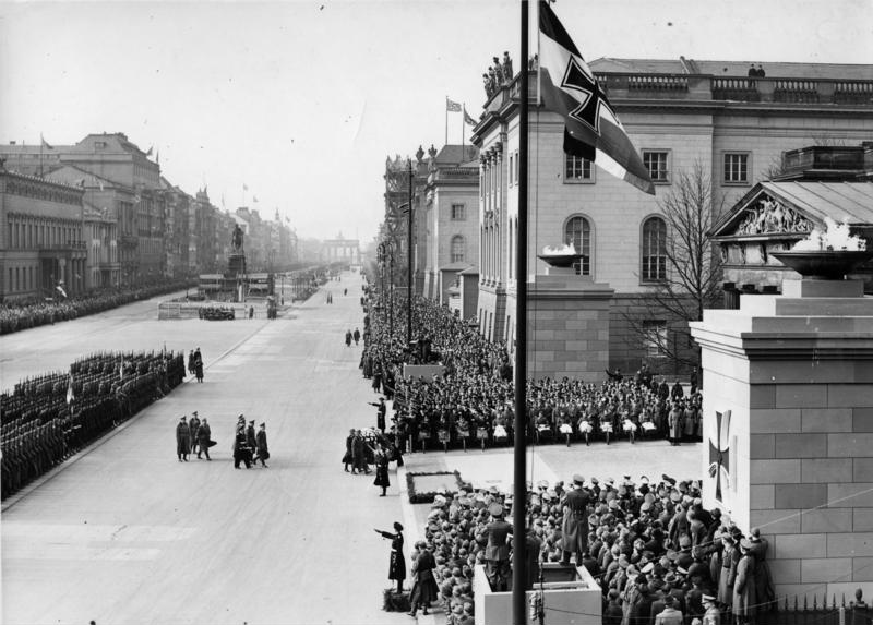 Berlin, Heldengedenktag, Ehrenmal Scherl Bilderdienst Heldengedenktag [15. März] 1942 in Berlin. Der Führer begibt sich begleitet von Großadmiral Raeder, Generalfeldmarschall Keitel, Generalfeldmarschall Milch, Reichsführer SS Himmler, Generaloberst Fromm, dem Reichsführer General d. Inf. Reinhardt und Reichskriegsopferführer Oberlindober zur Kranzniederlegung in das Ehrenmal [Unter den Linden]. 1648-42